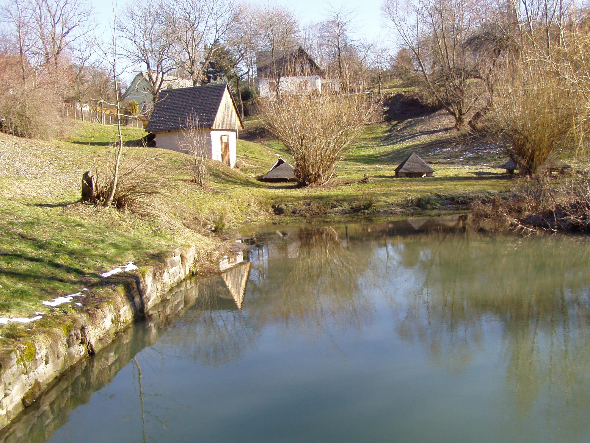 Kladruby (Kohoutov)